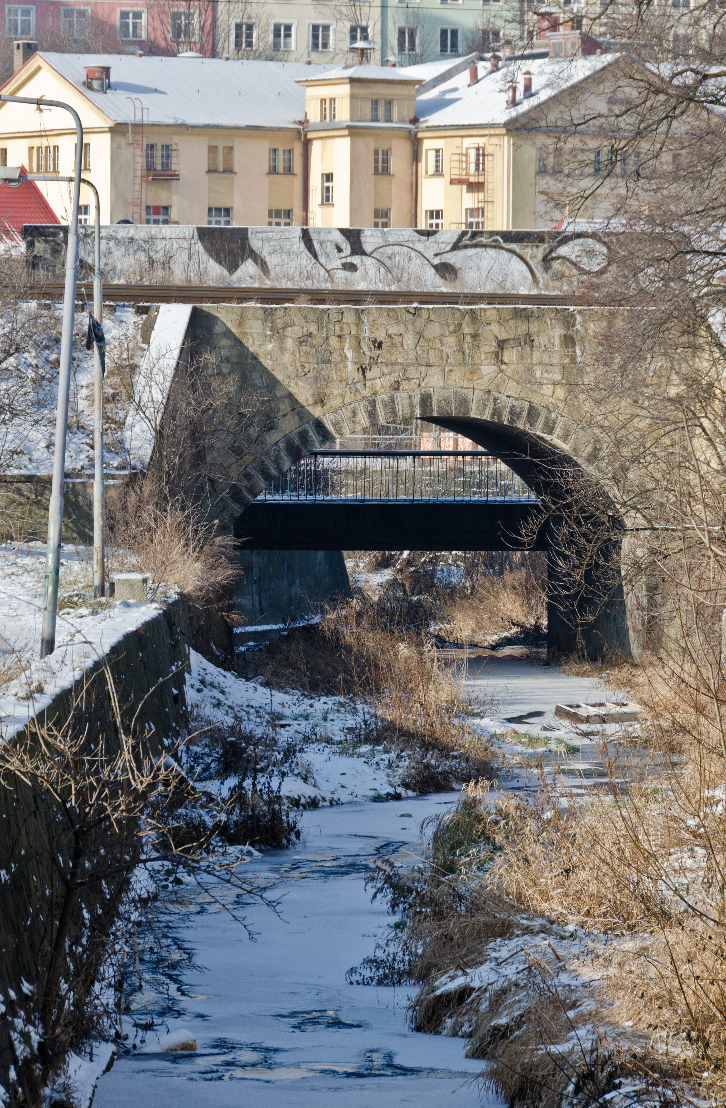 Kanał Jodłownika w Kłodzku